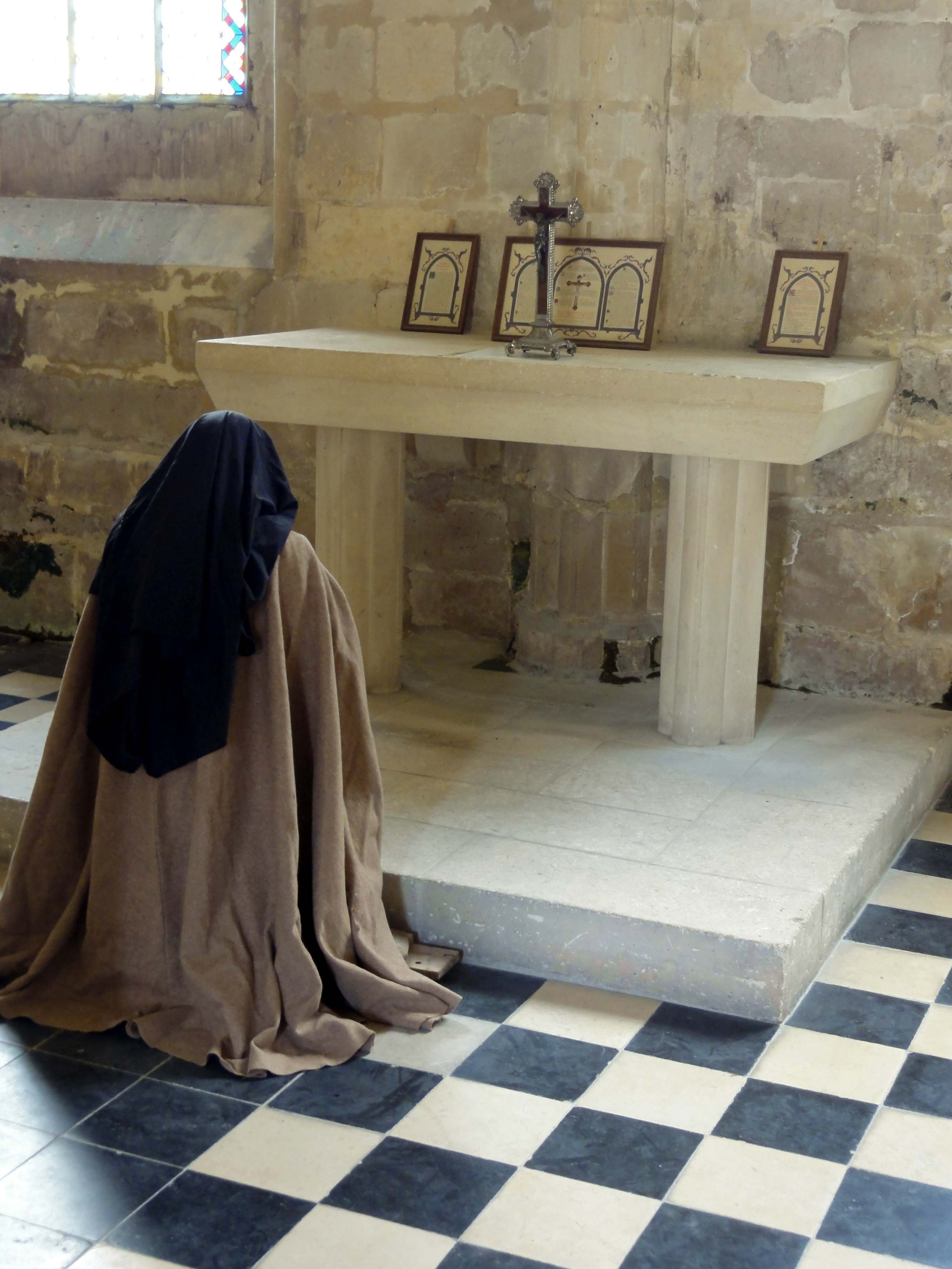 Intérieur de l'abbaye - voir titre.